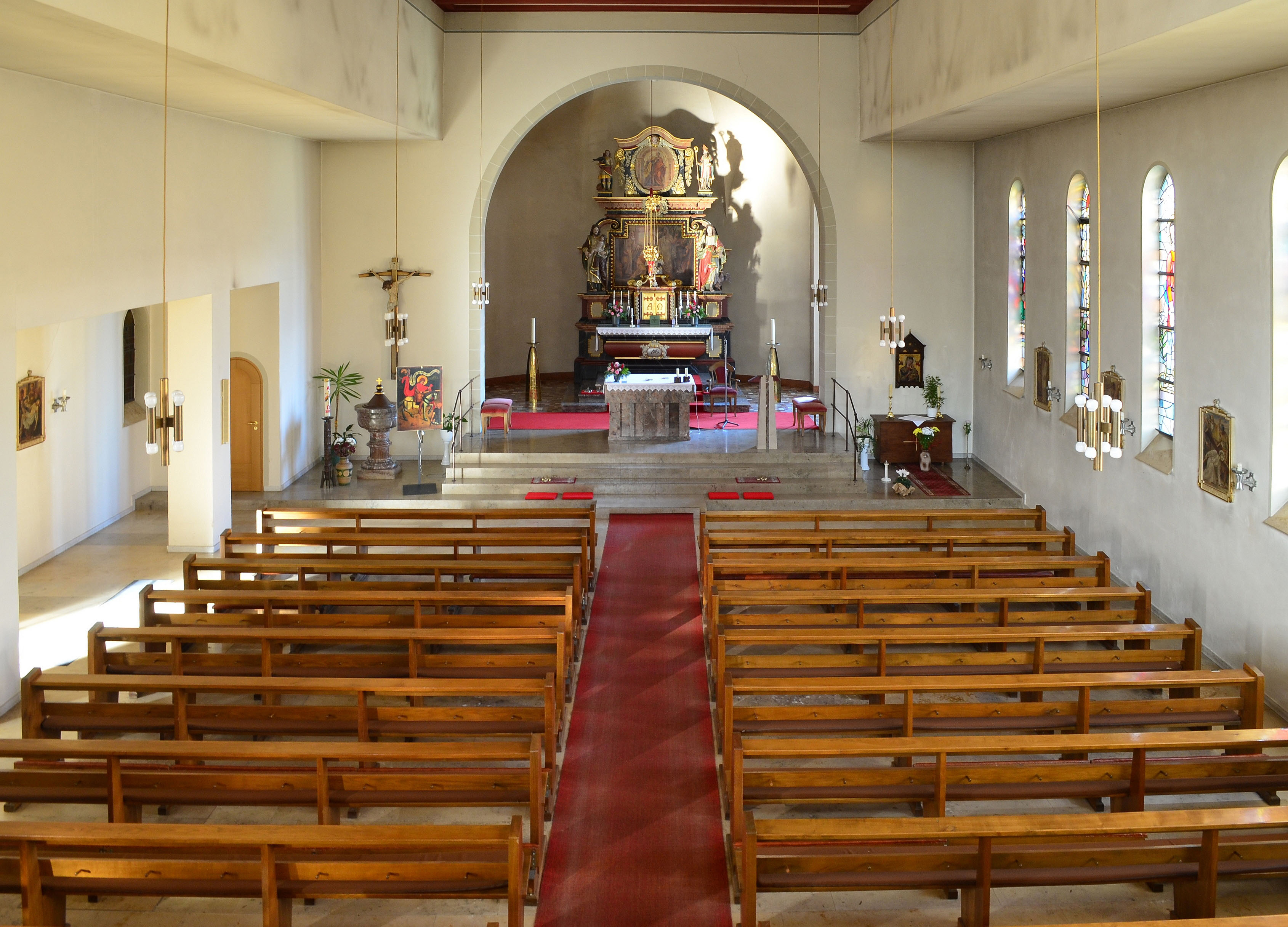 Brilon, Hoppecke, St. Mariä-Heimsuchung, Blick von der Empore auf den Altar